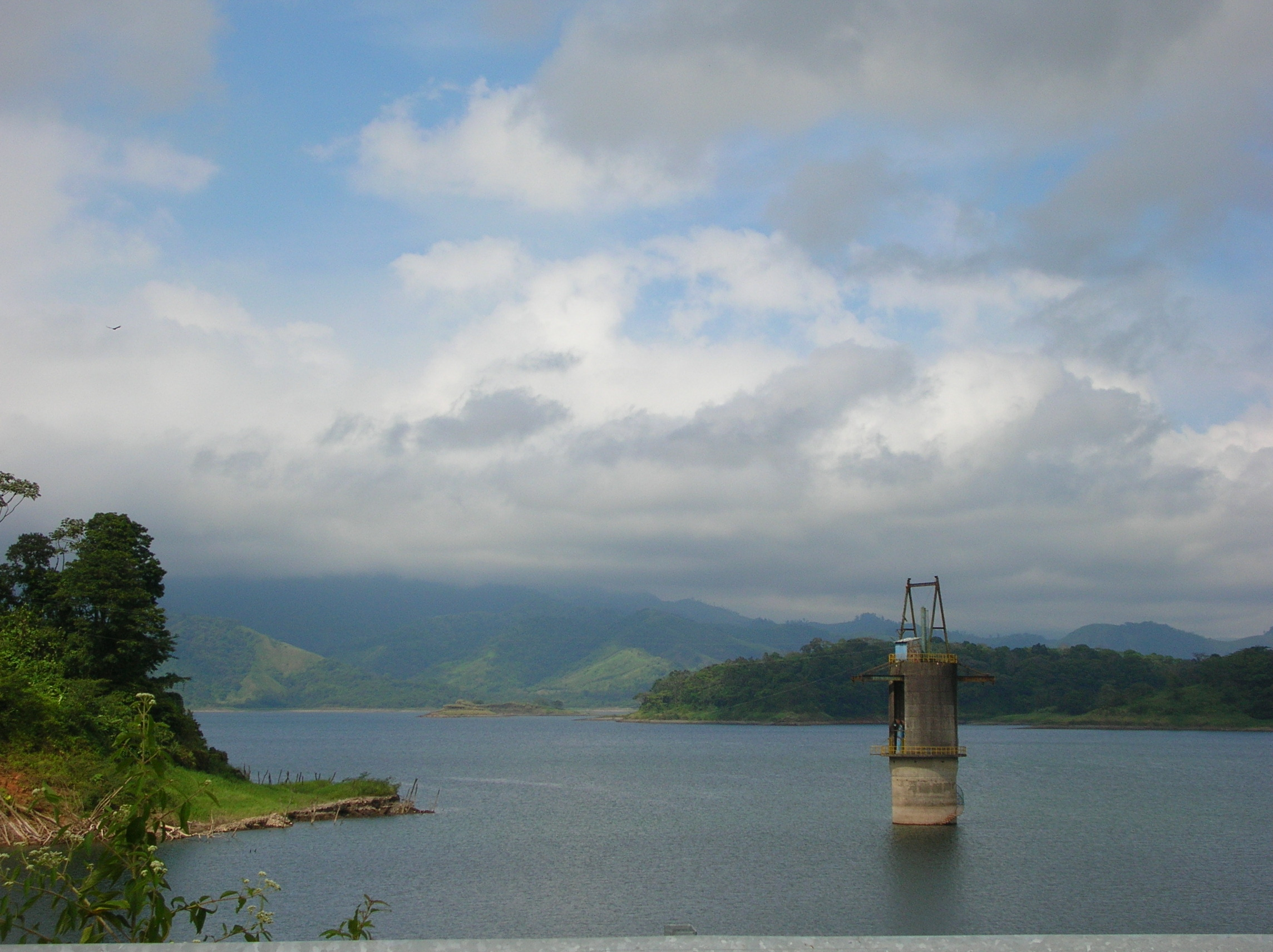 Installations hydro-électriques du lac Arenal, Costa Rica